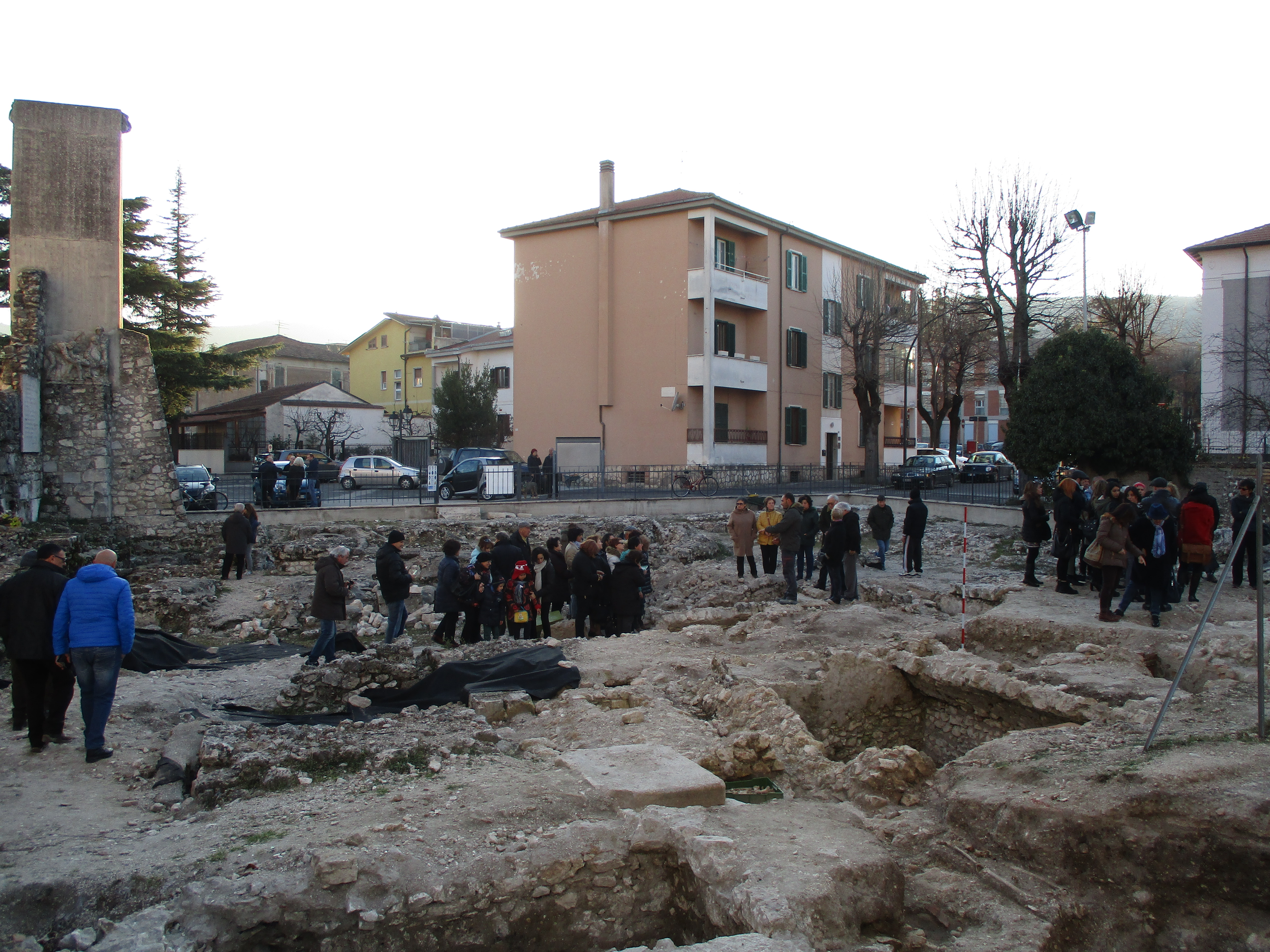 Resti della collegiata